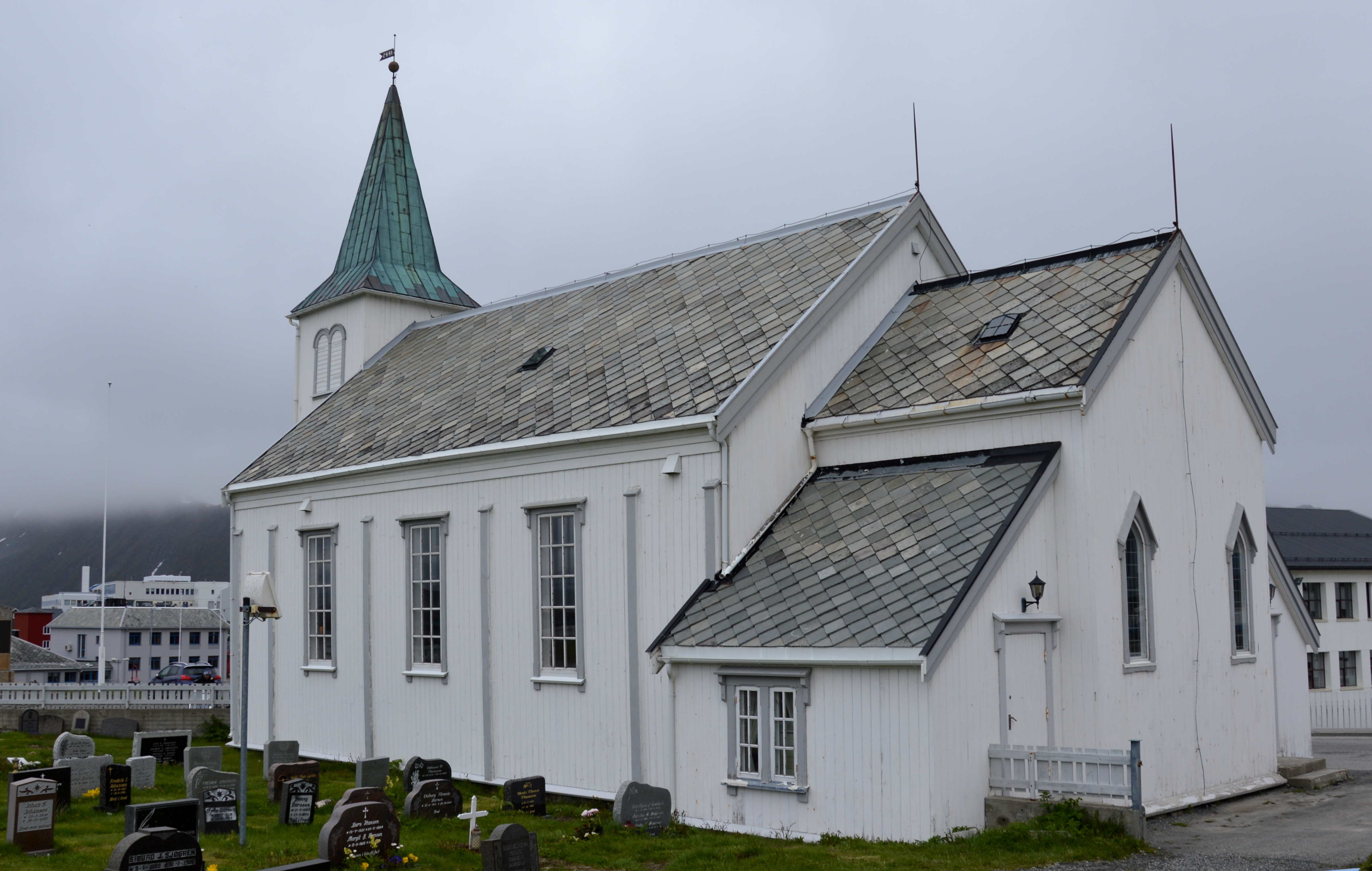 Kirche von Honningsvag